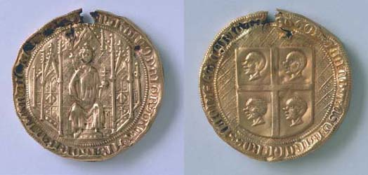 Creu d'Alcoraz de la Butlla d'or de Martí I d'Aragó "l'Eclesiàstic"